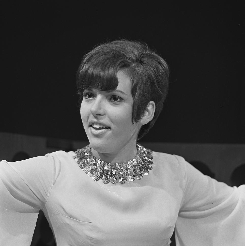 De Vlaamse zangeres Samantha treedt op in het televisieprogramma Een avondje teevee met André.